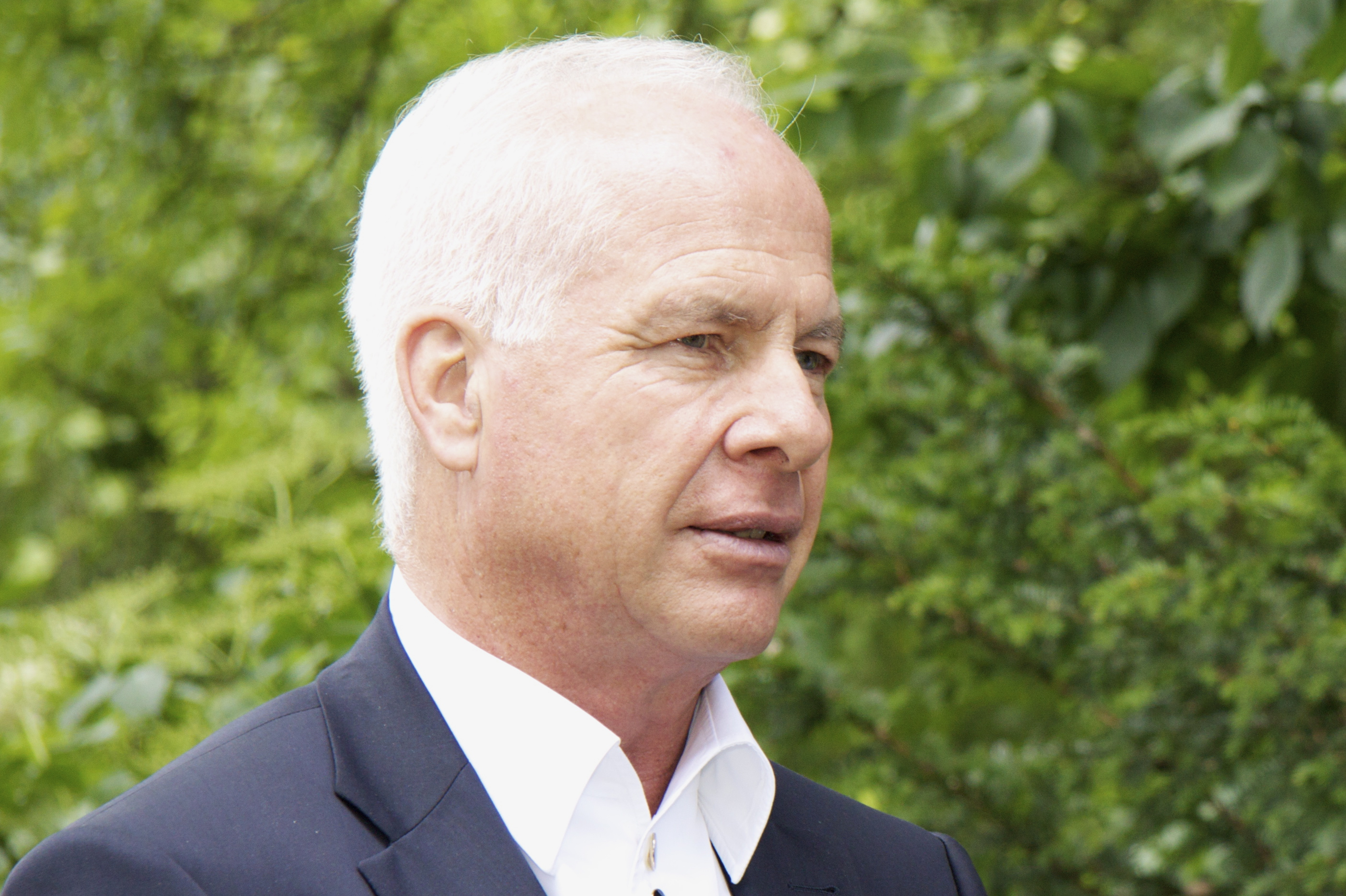 Werner Stauffacher, Zürcher Rechtsanwalt und erster Schweizer, der die Puschkin-Medaille des Präsidenten der Russischen Föderation erhalten hat.